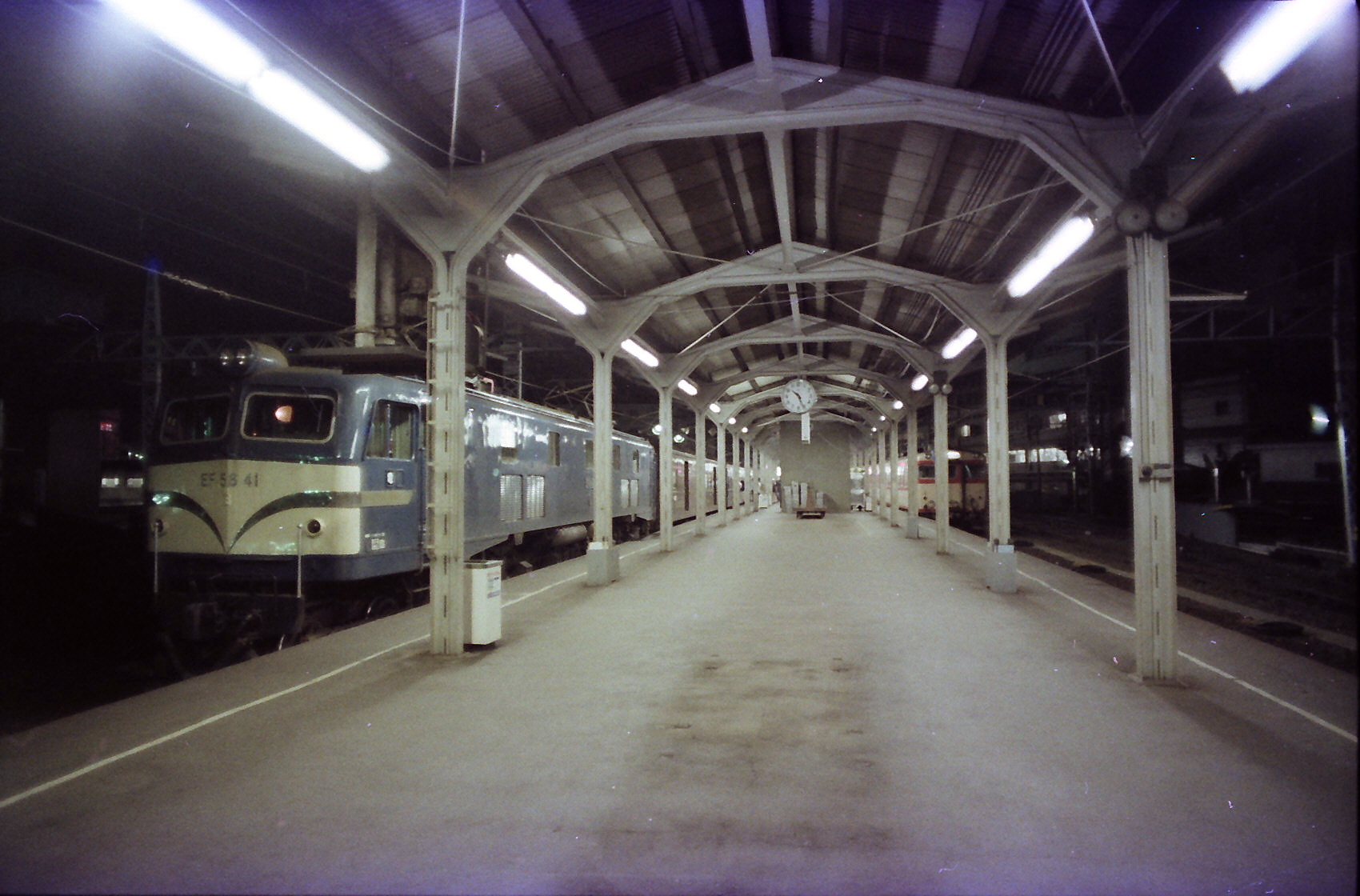 阪和線天王寺駅 寝台列車「南紀」